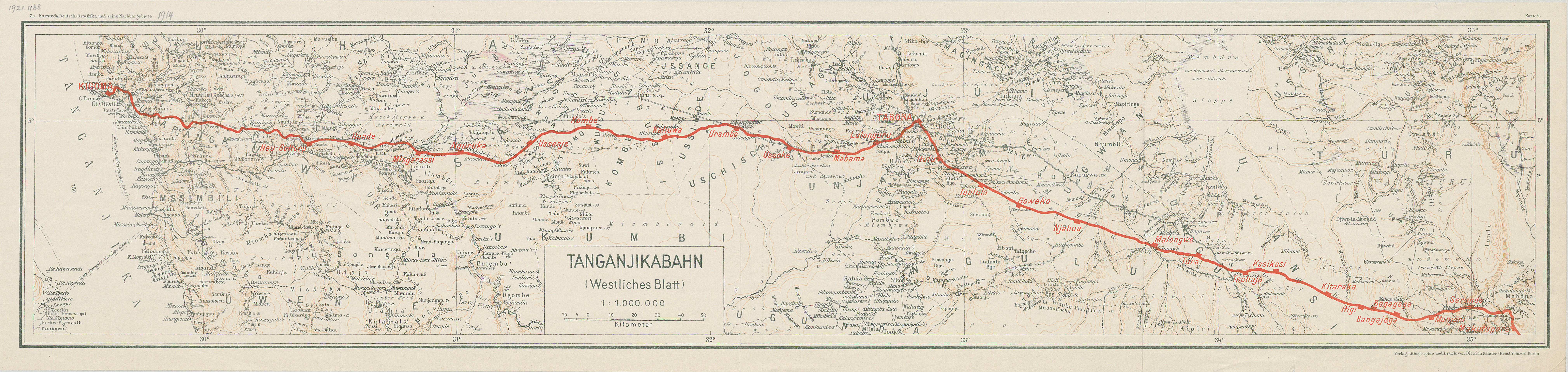 Tanganjikabahn (westliches Blatt)